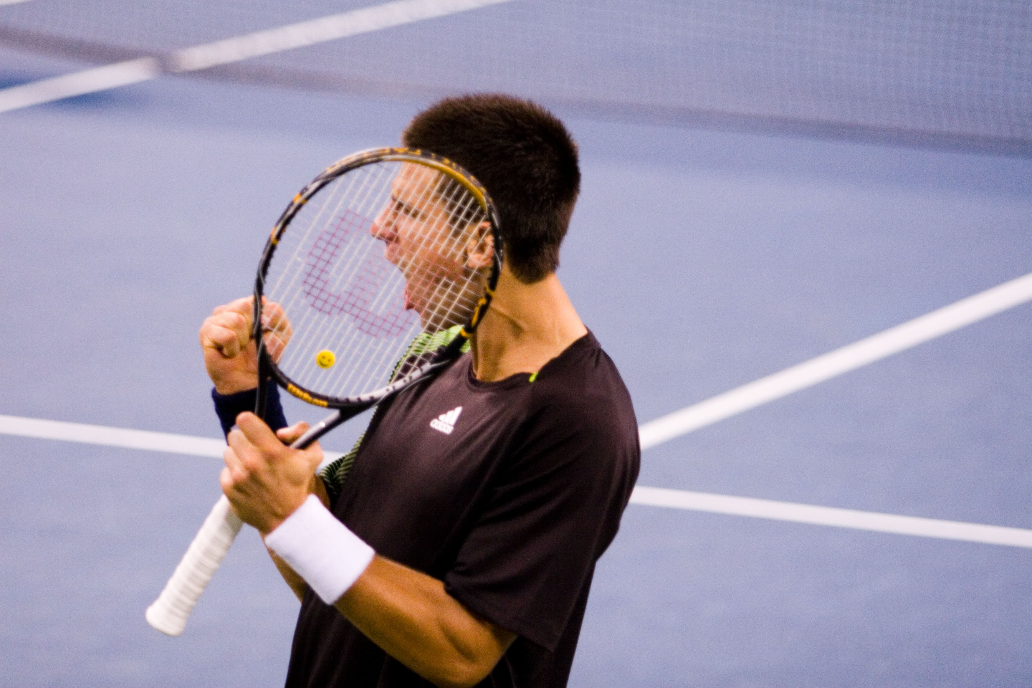 Novak Đoković at 2008 US Open